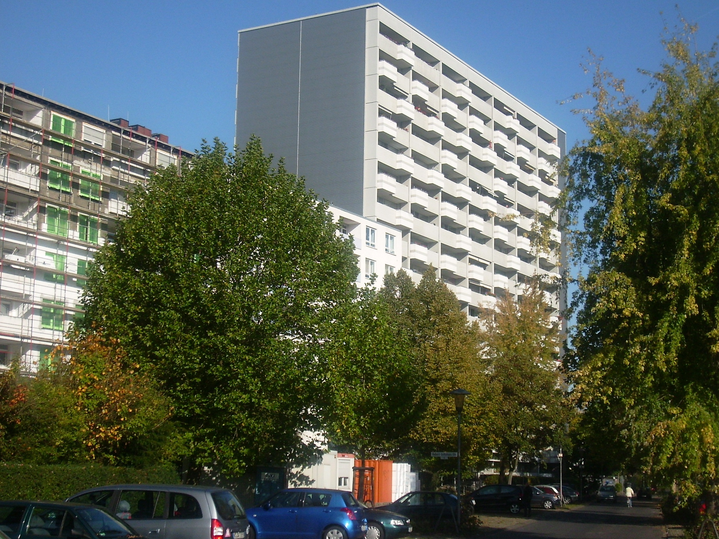 Höchstes Wohnhaus von Köln-Neubrück an der Robert-Schuman-Str.